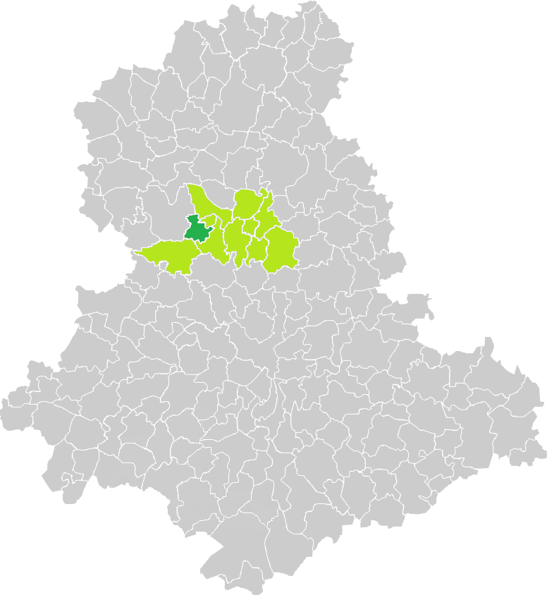 Carte de situation de la commune de Vaulry (en vert foncé) dans le votre Canton (en vert clair) sur une carte des communes de la Haute-Vienne